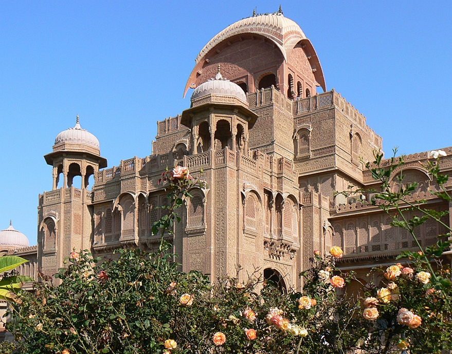 Lalgarh Palace in Bikaner, Rajasthan, India